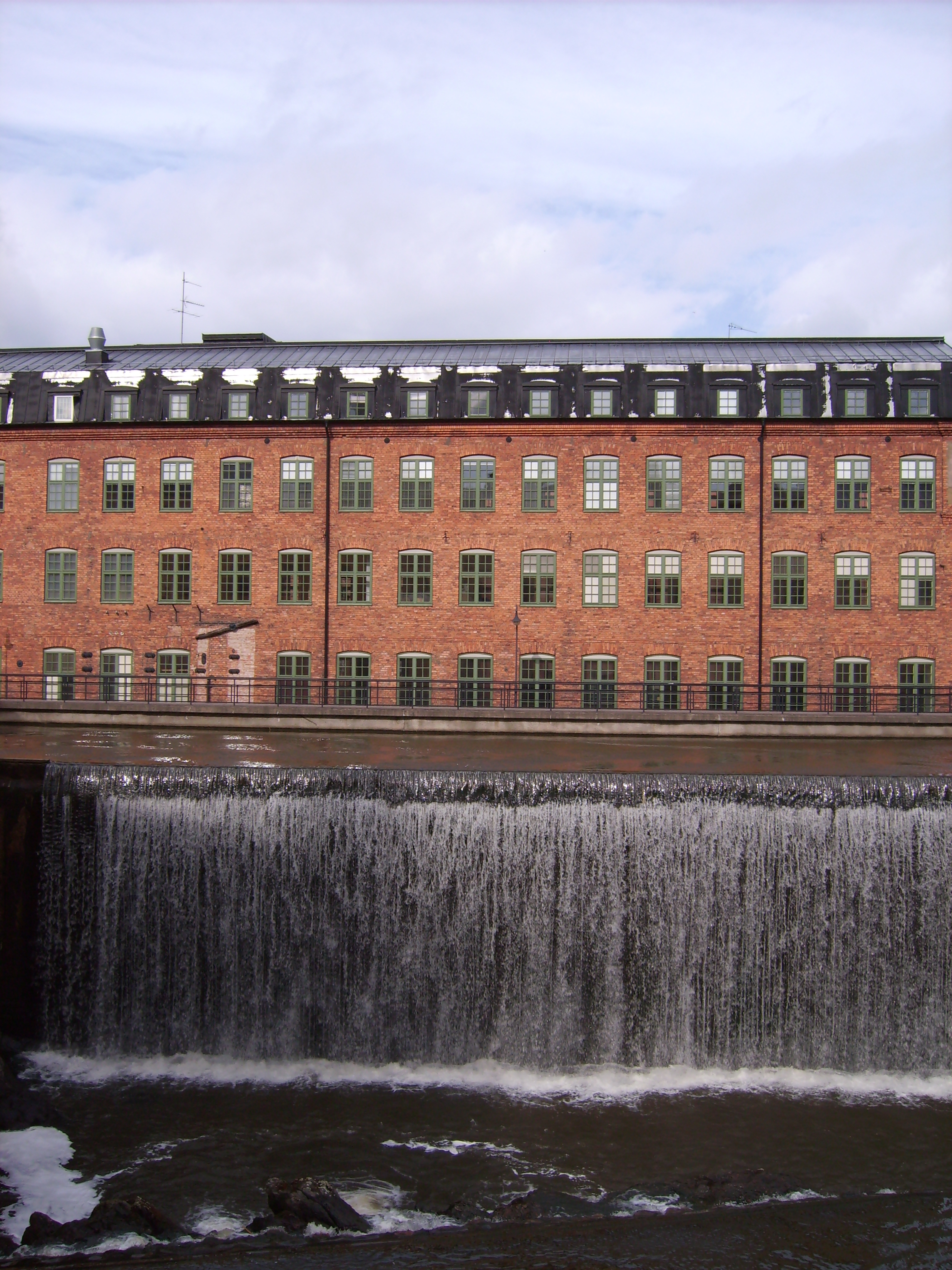 Bilden är fotograferad av Harri Blomberg. Photo by Harri Blomberg.